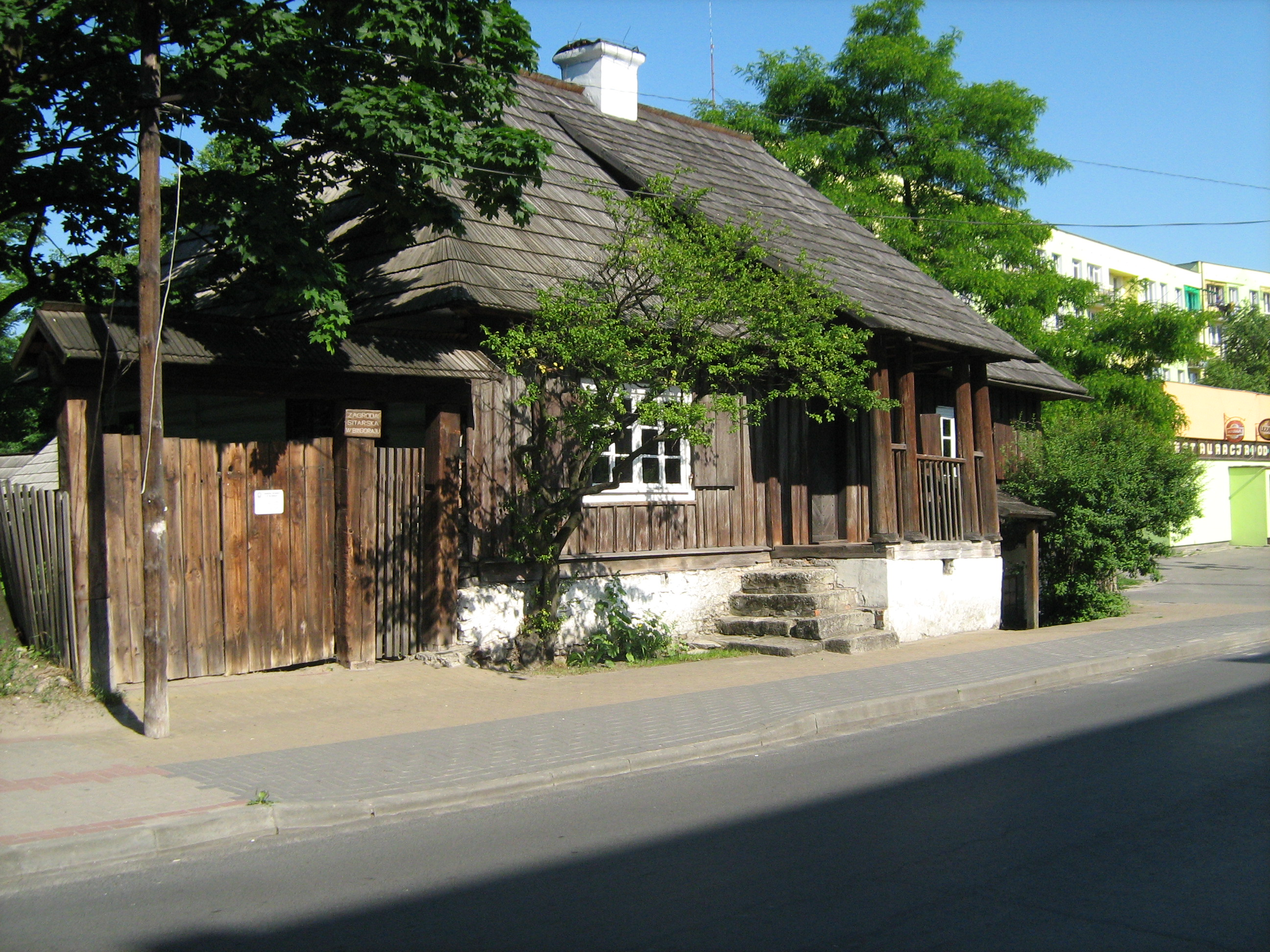 Skansen "zagroda sitarska" w Biłgoraju. Data wykonania: 8 czerwca 2007 r.